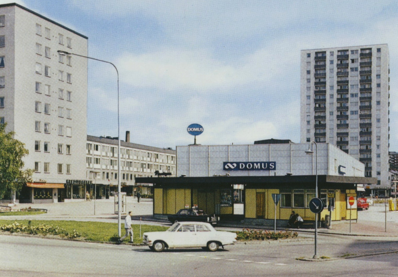 Huddinge centrum med Domus-varuhuset